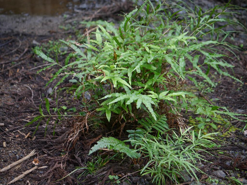 Pteris cretica：オオバノイノモトソウ（後ろ） Pteris multifida：イノモトソウ（前） 2014/09/20 和歌山県田辺市：Tanabe City. Wakayama Pref. Japan